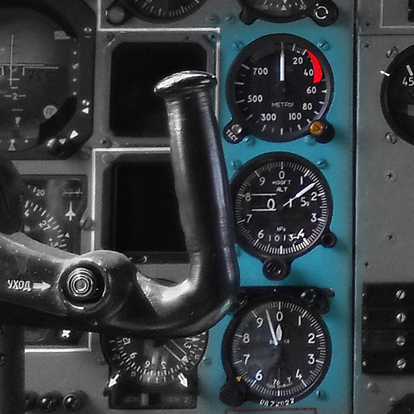 Радиовысотомер РВ-5, диспетчерский футомер УВИД-15, высотомер ВМ-15 на приборной панели самолёта Ту-154М-100